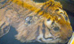 iranian tiger